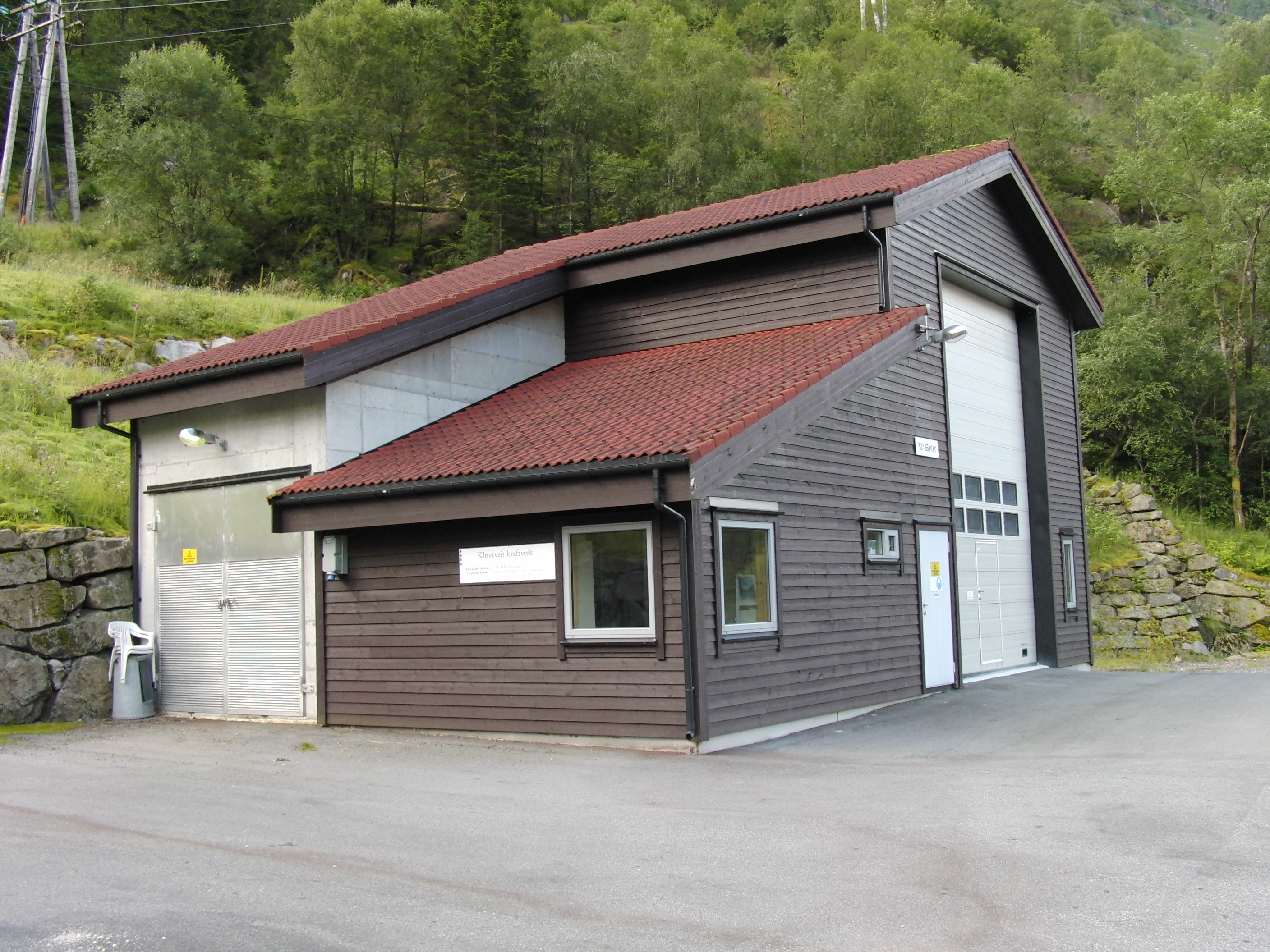 Kløvtveit kraftverk